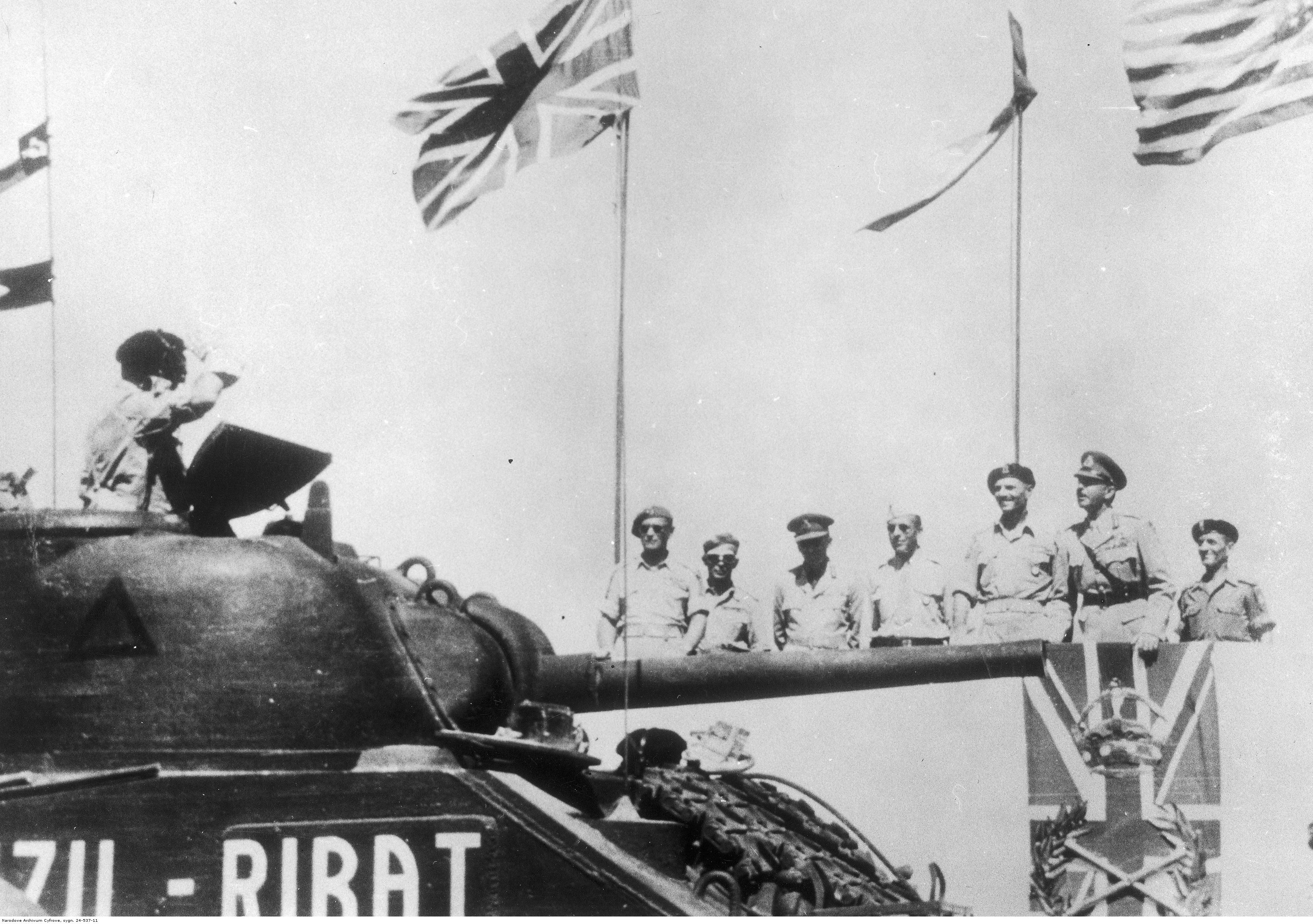 2 Warszawska Dywizja Pancerna w defiladzie pod Loreto. Gen. Bronisław Rakowski w czołgu M4 Sherman "Kizil-Ribat" przed trybuną honorową; 15 sierpnia 1945. Na trybunie stoją m.in.: marszałek Harold Alexander (2. z prawej), gen. Władysław Anders (3. z prawej) i gen. Zygmunt Szyszko-Bohusz (1. z lewej). Archiwum Fotograficzne Tadeusza Szumańskiego. Sygnatura: 24-537-11